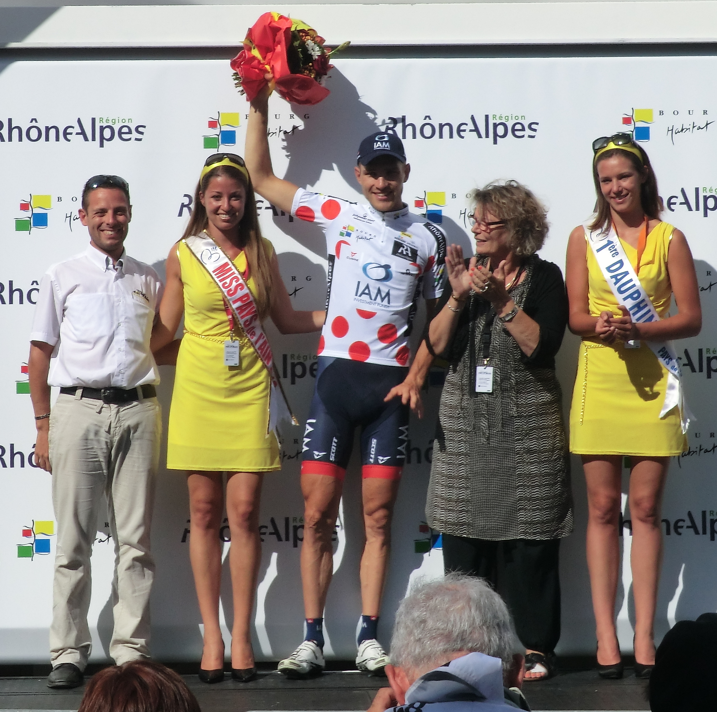 Podiums du Tour de l'Ain 2013, à l'issue de la dernière étape à Belley.